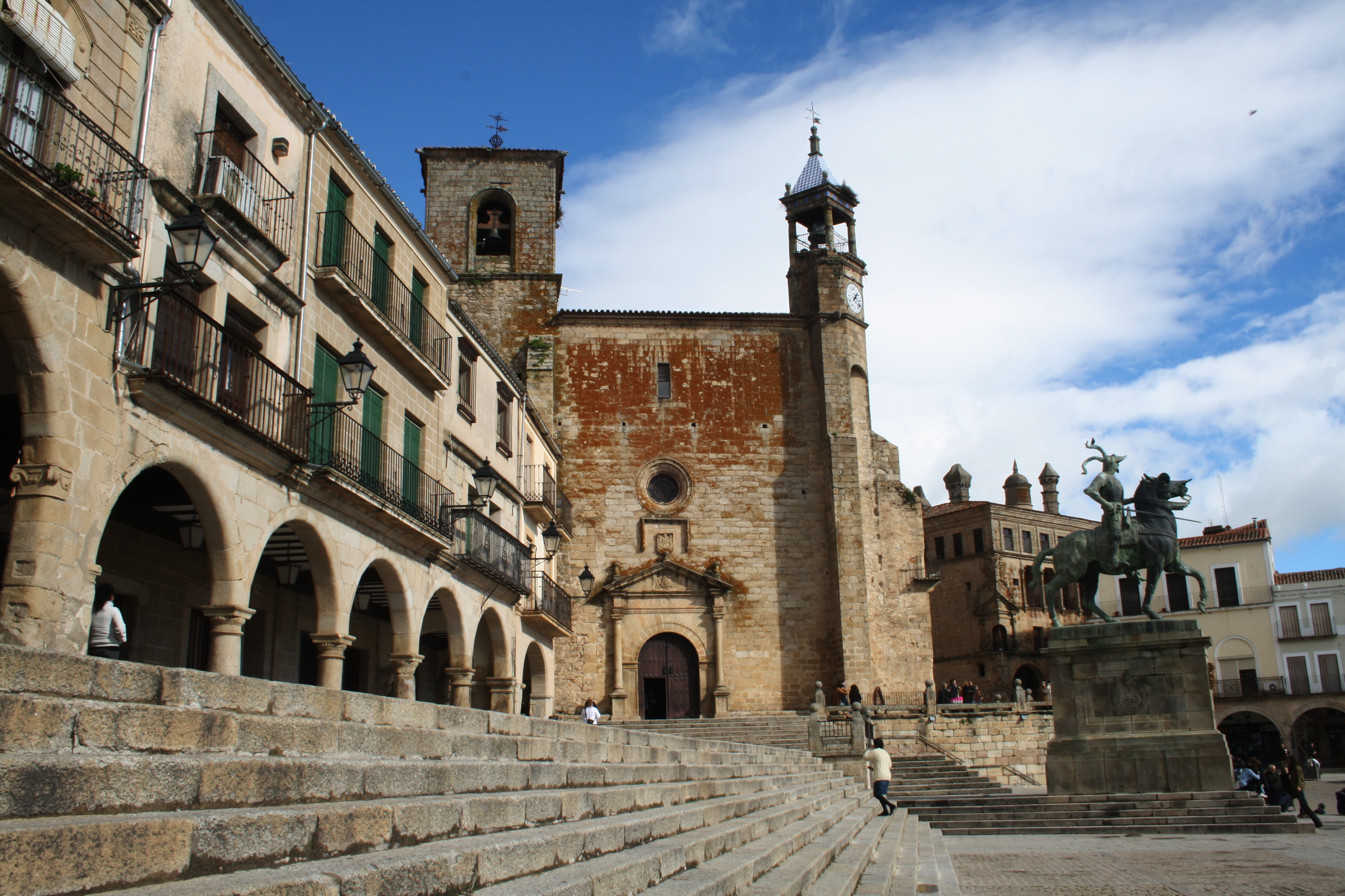 Trujillo, provincia de Cáceres, Extremadura, España.